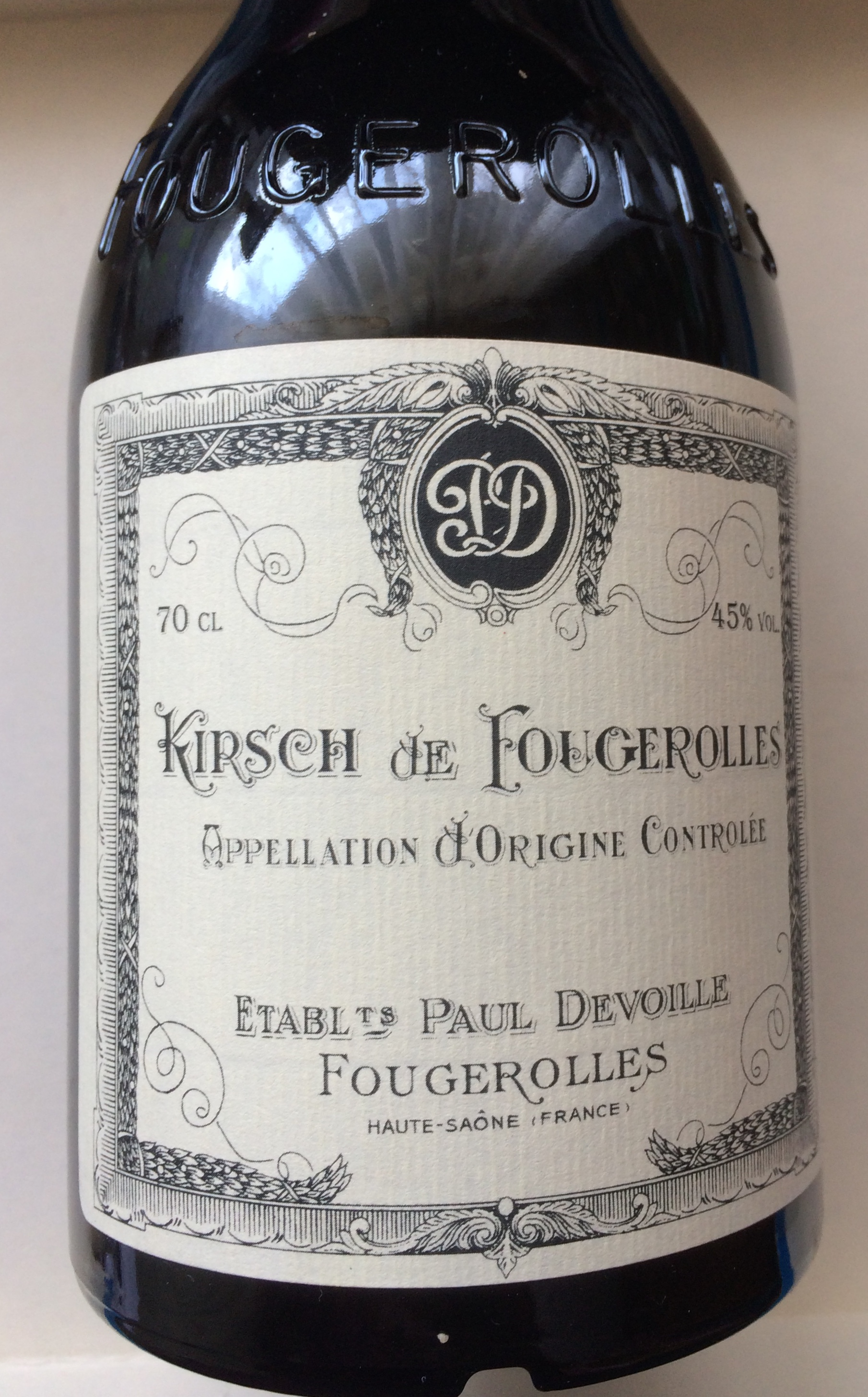 Bô d'eau-de-vie kirsch de Fougerolles AOC de la distillerie Paul Devoille.